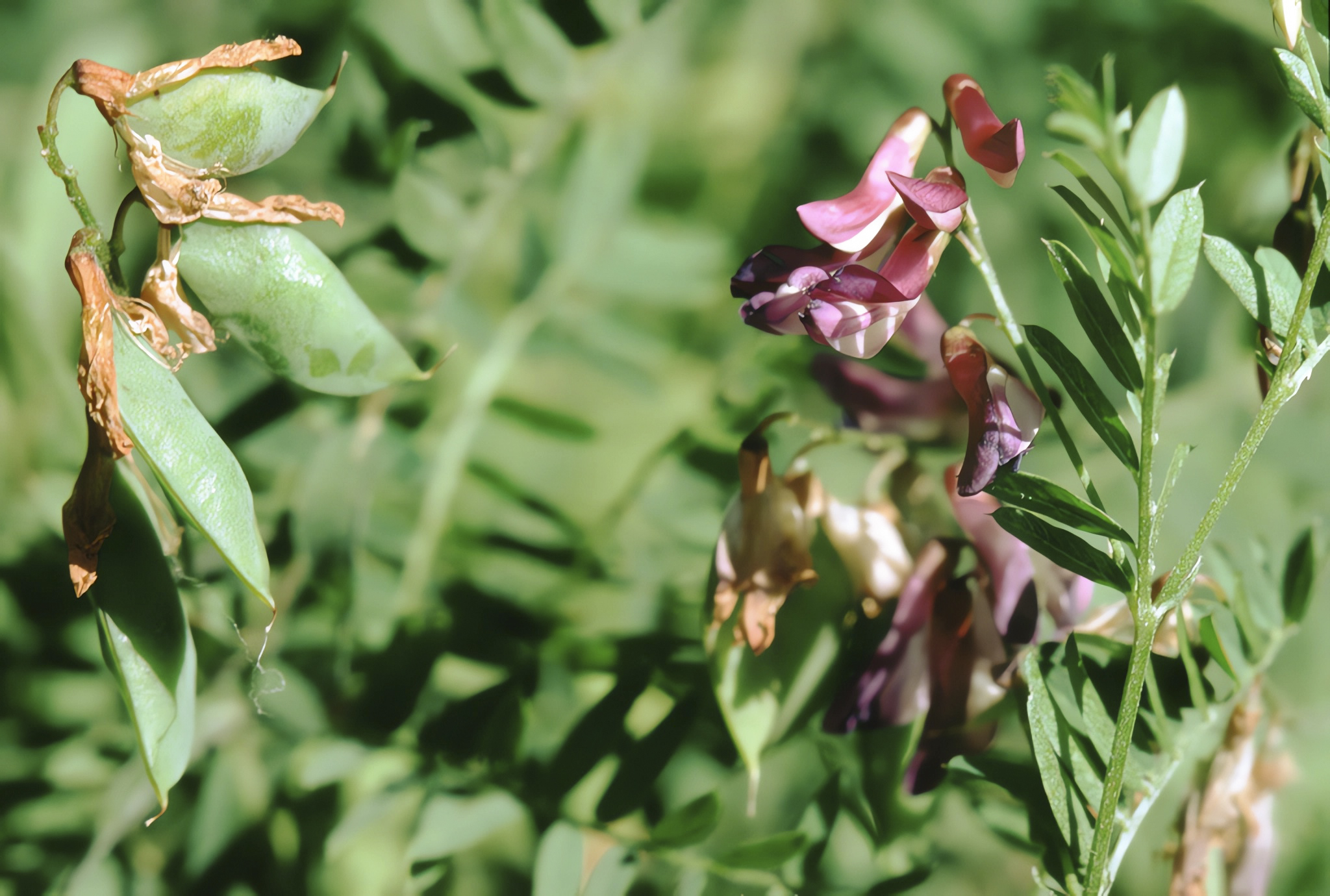 Vicia cassubica (Unterfranken, Germany)